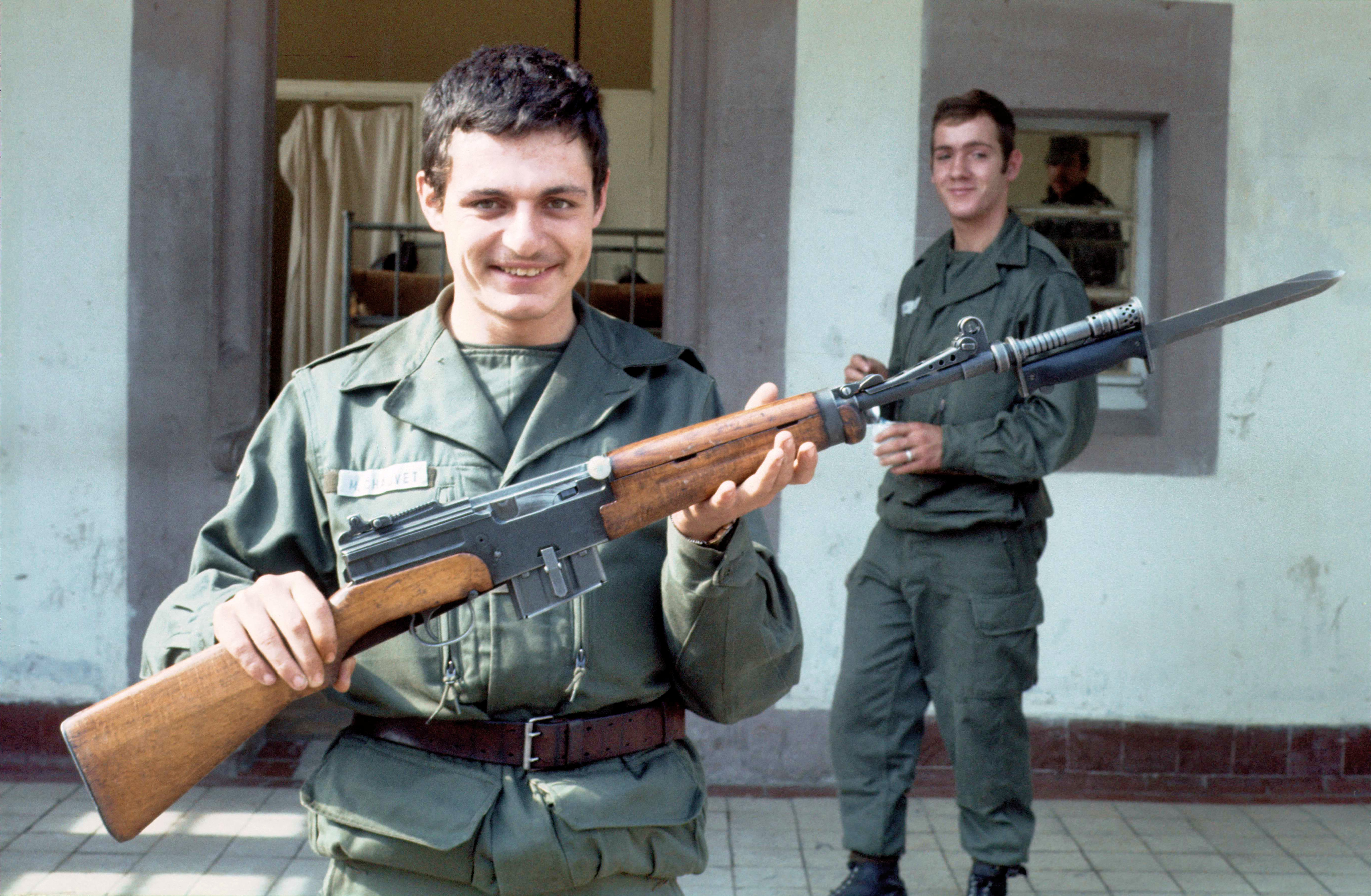 133 C/C Chauvet (Caporal de relève) montrant un MAS 49/56 (FSA) devant le poste de police. 9/5.